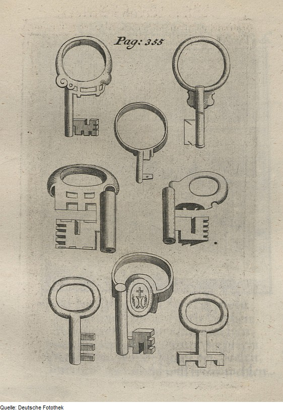 Original image description from the Deutsche FotothekStändebuch & Schlüssel & Schlüsselbart & Bart